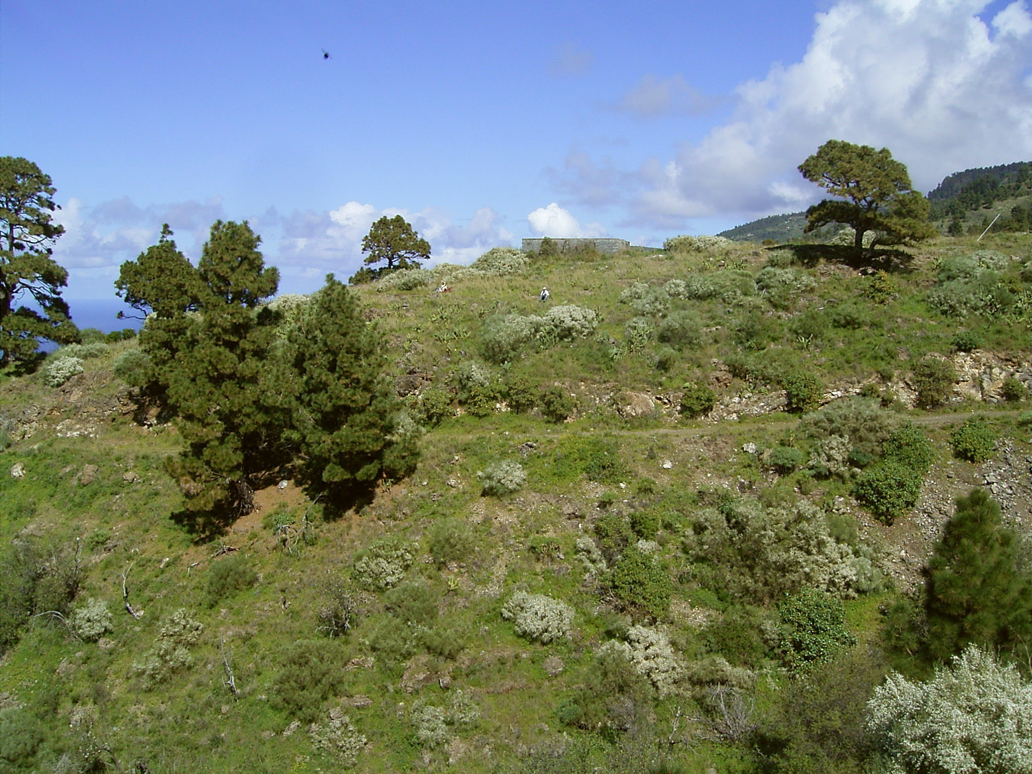 Retama raetam growing in Puntagorda, La Palma, Canary Islands